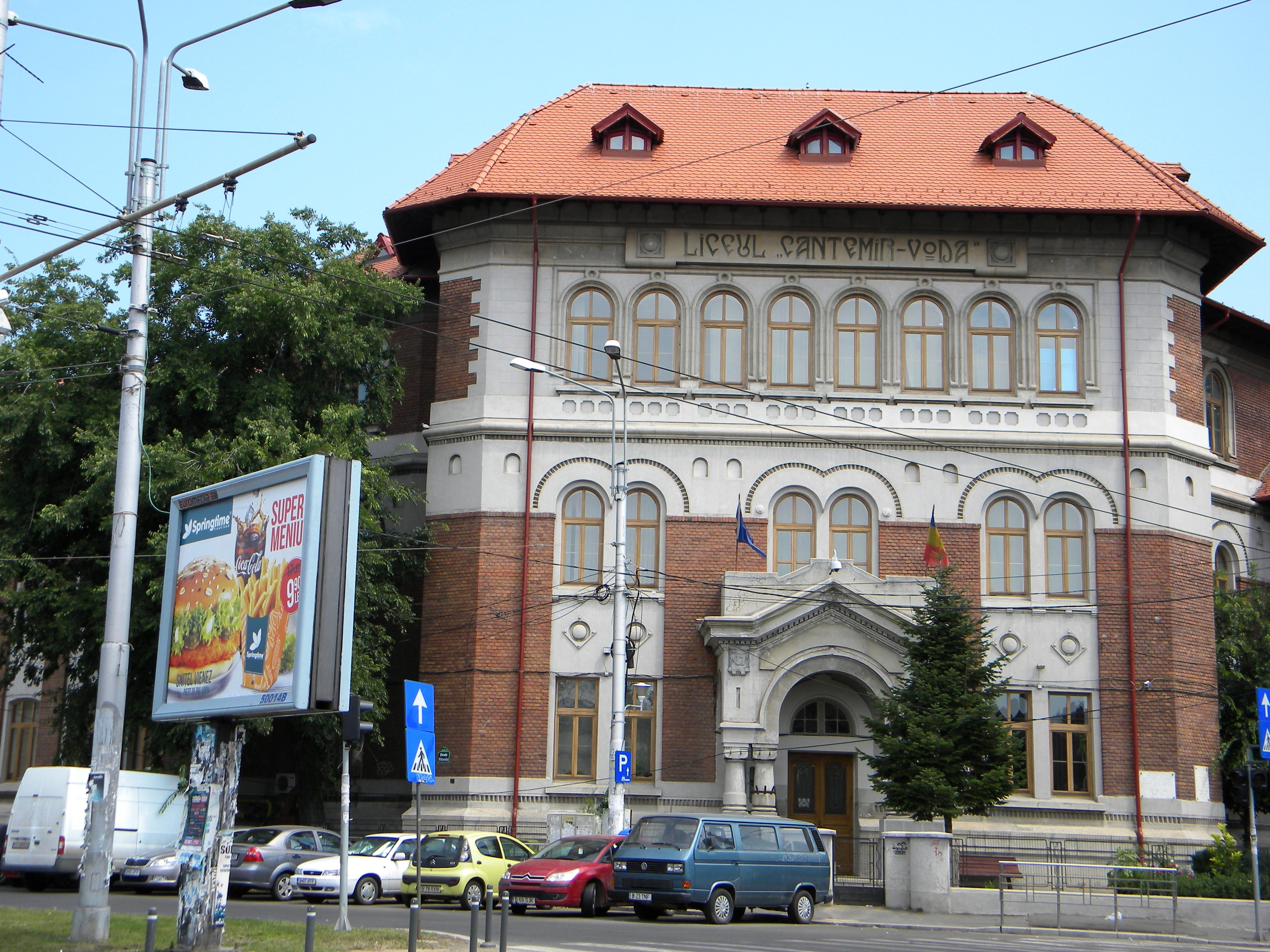 Liceul Dimitrie Cantemir pe Bd. Dacia nr. 117, Bucuresti (fatada)